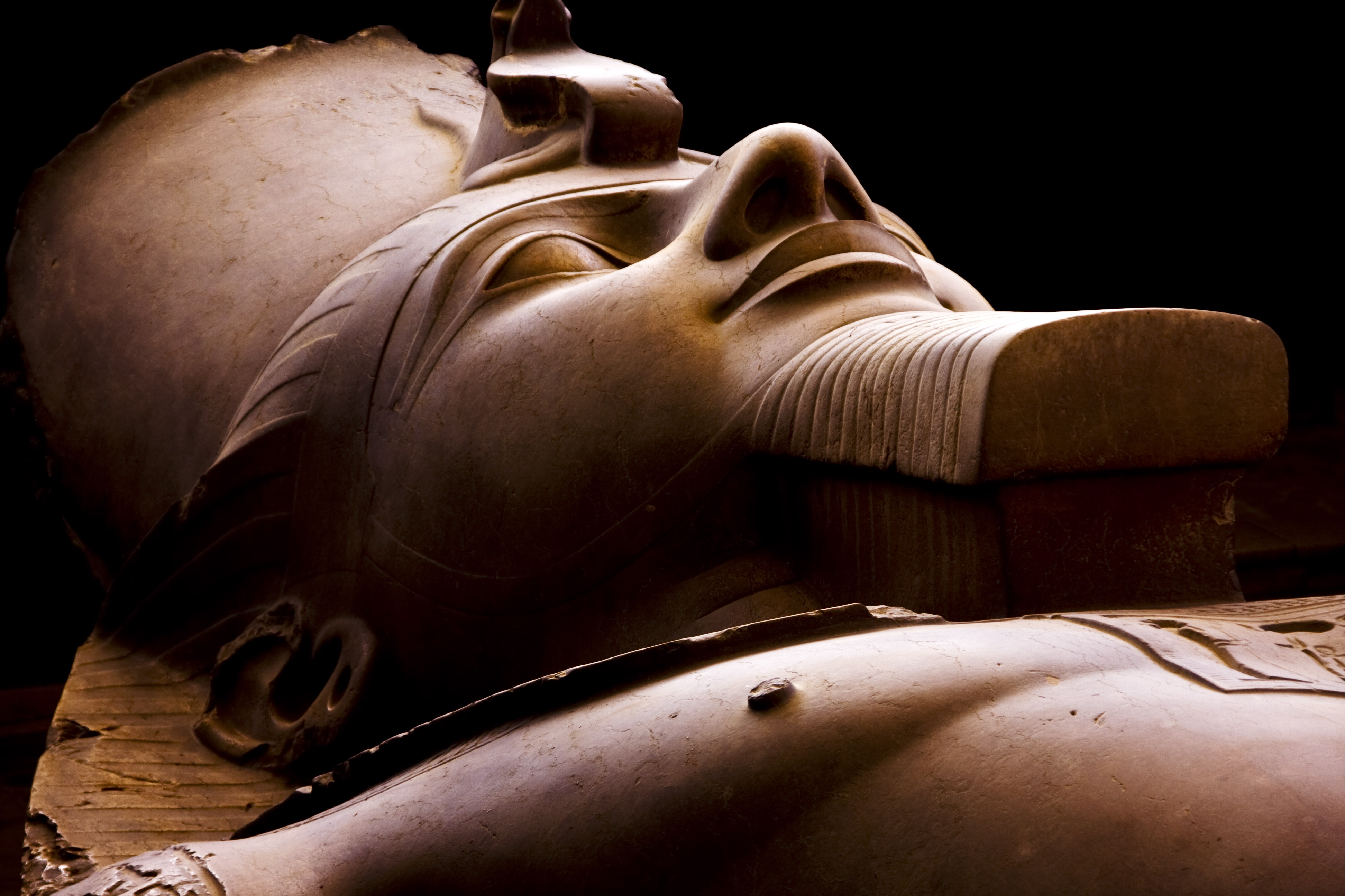 Cairo sculptures, Egypt.